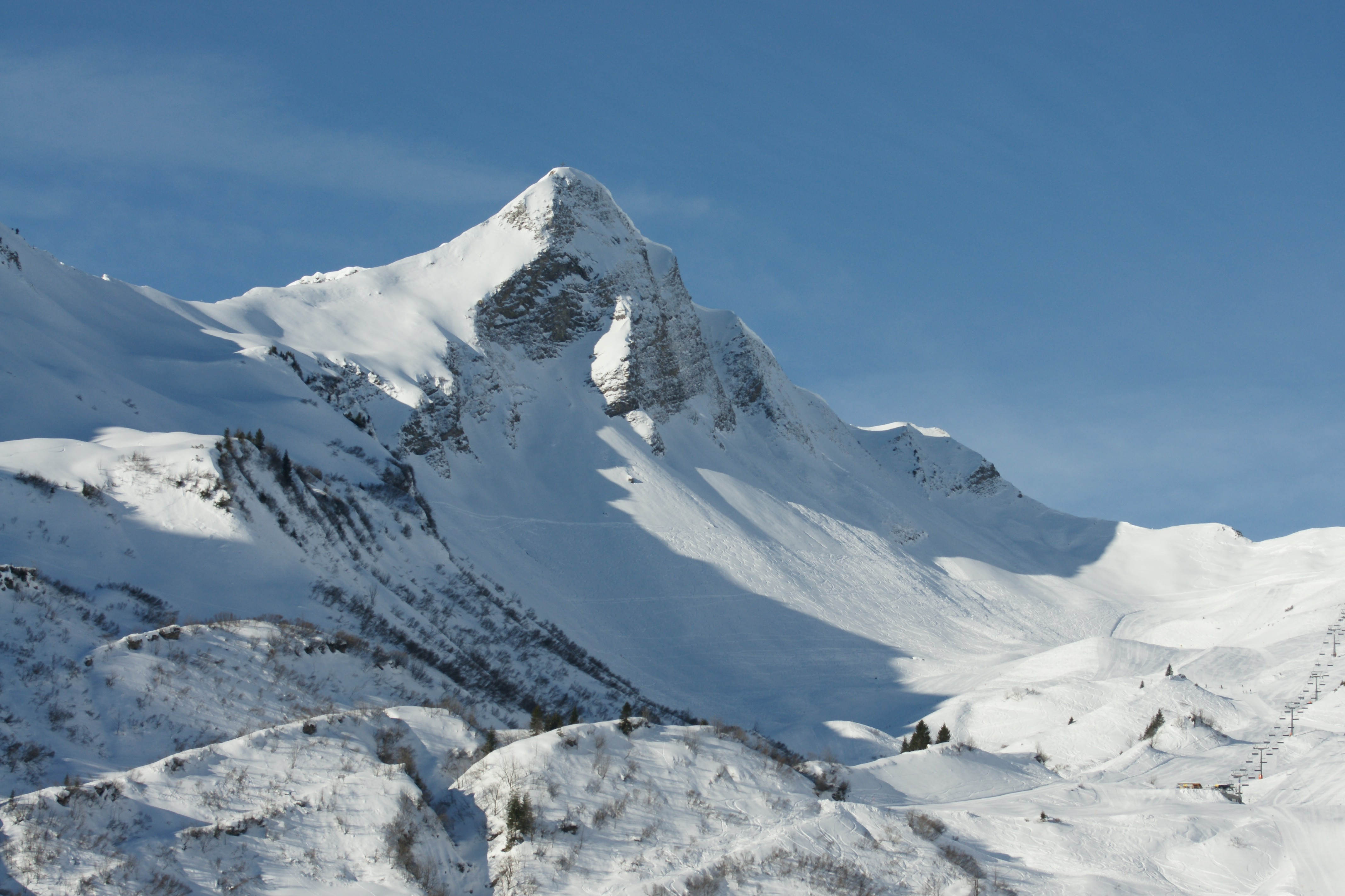 Blick vom Fusse des Zafernhornes in Fontanella - Faschina auf den höchsten Berg des Bregenzerwaldgebirges, dem Glatthorn.